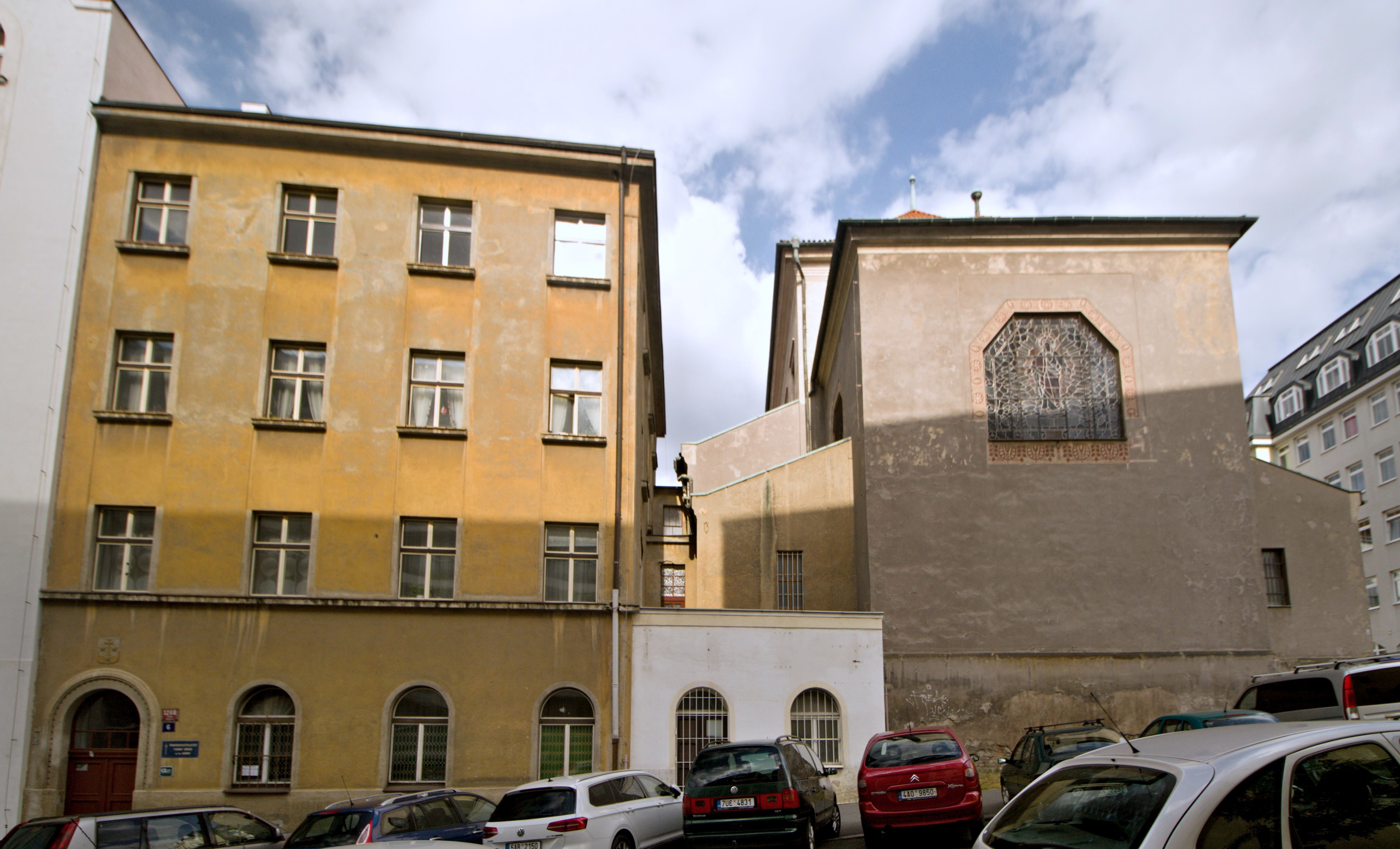 Žižkov kostel sv. Anny